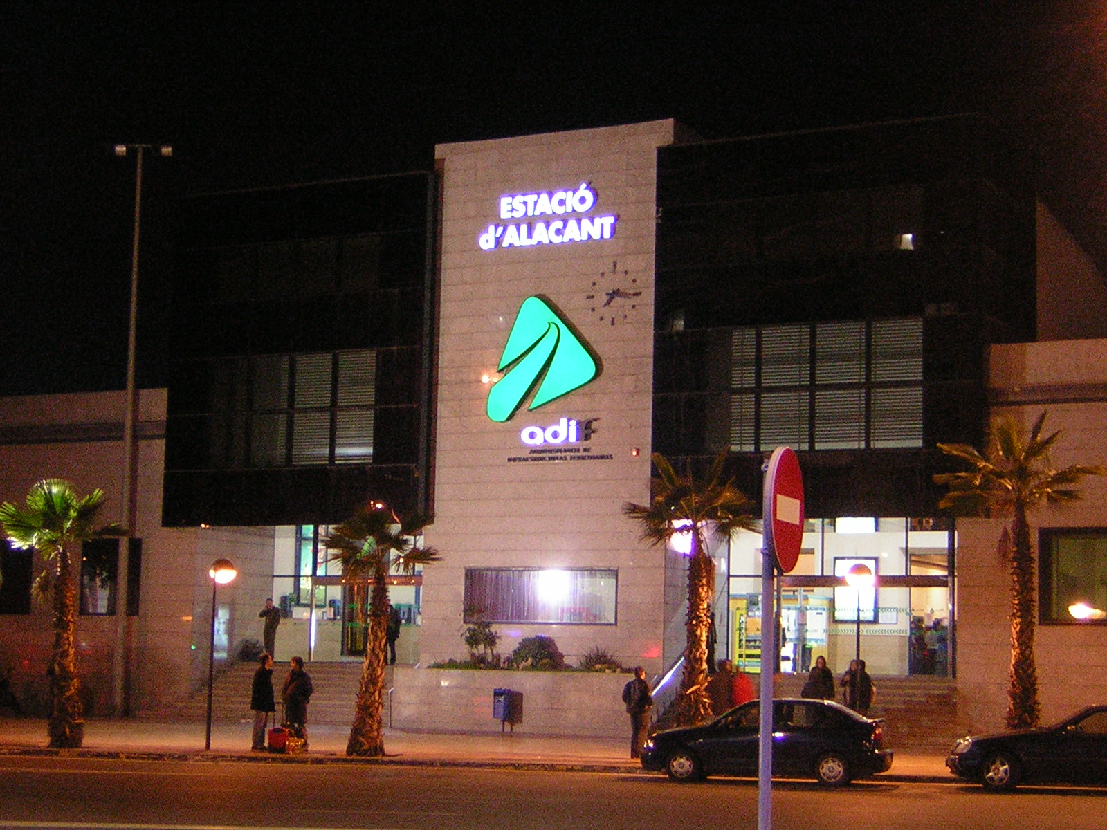 Estación de Alicante